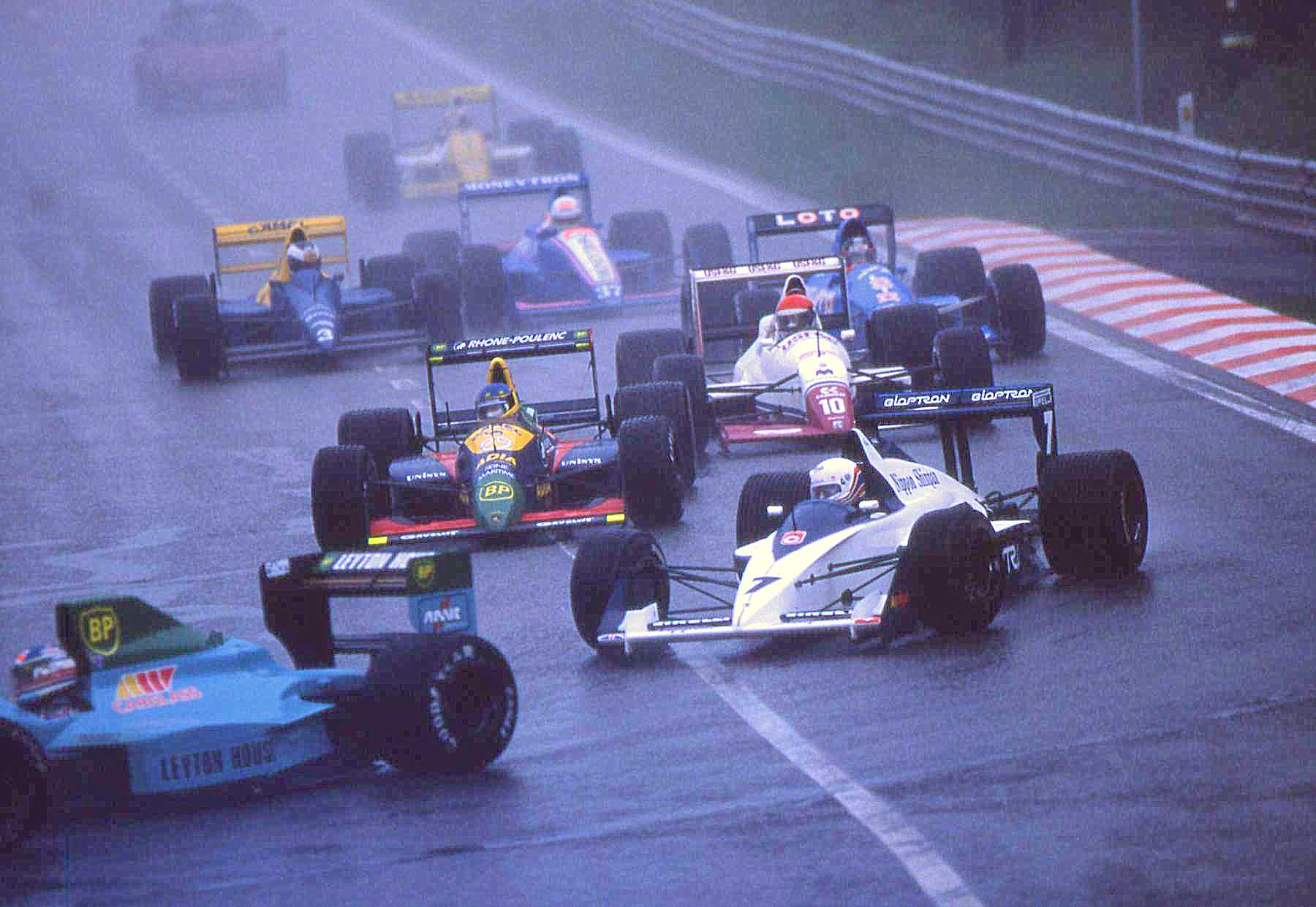 Scan diapo argentique.